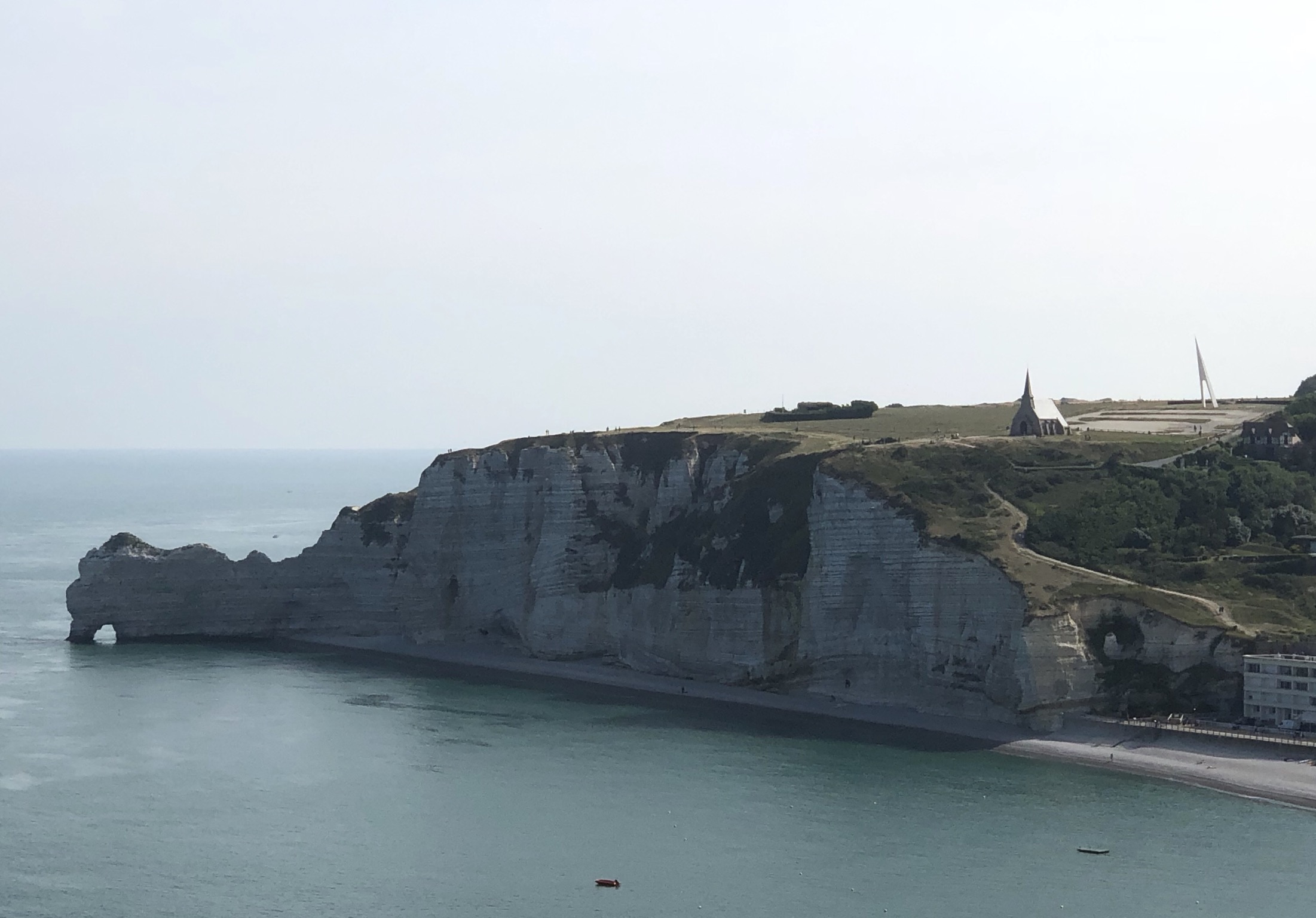 Strand von Étretat